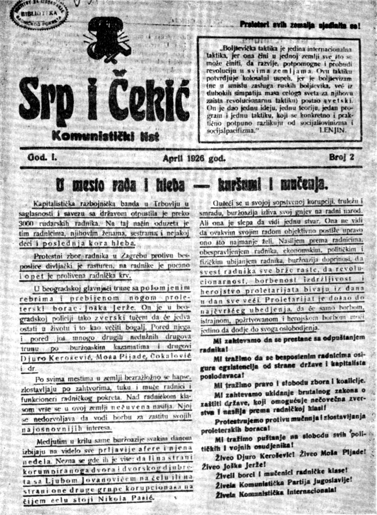 Srpskohrvatski / српскохрватски: Srp i čekić, ilegalni list Komunističke partije Jugoslavije pokrenut u Beču.